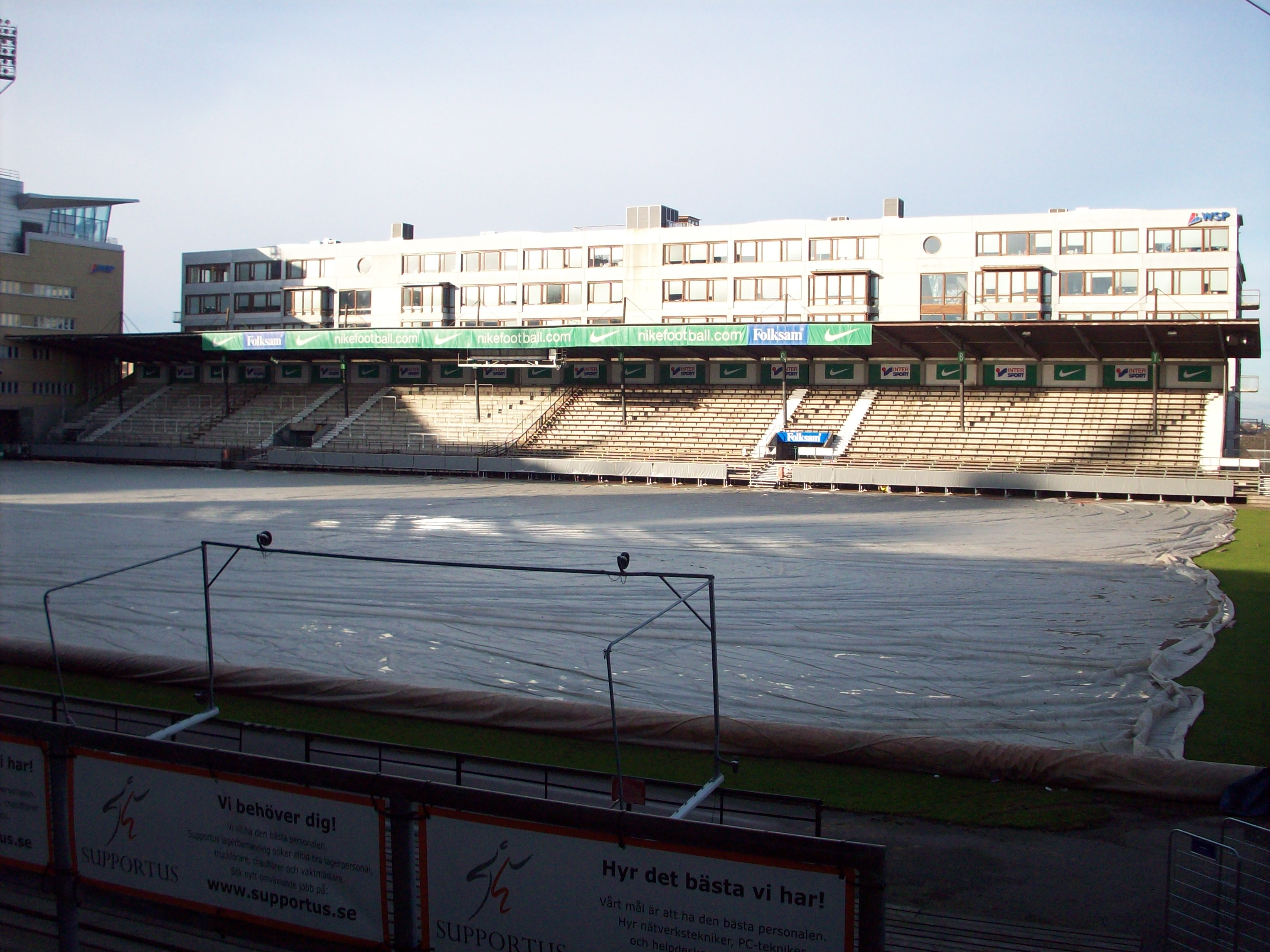 Söderstadion in Johanneshov, Stockholm. Pitch and north stand.